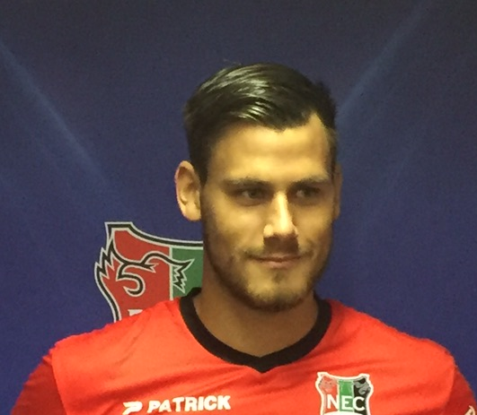 Van links naar rechts Gregor Breinburg, Dario Dumic en Wojciech Golla